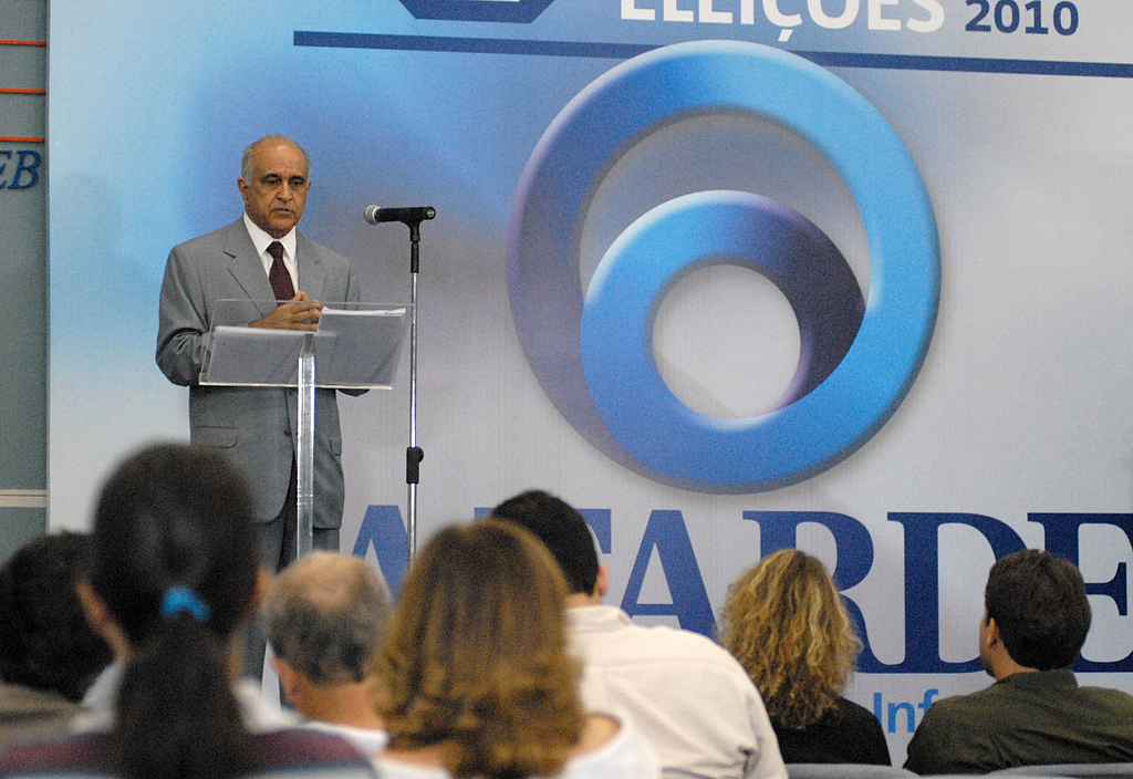 O candidato ao governo da Bahia Paulo Souto participa da sabatina do jornal A Tarde nesta quarta-feira (01/09). Foto - Valter Pontes/Coperphoto